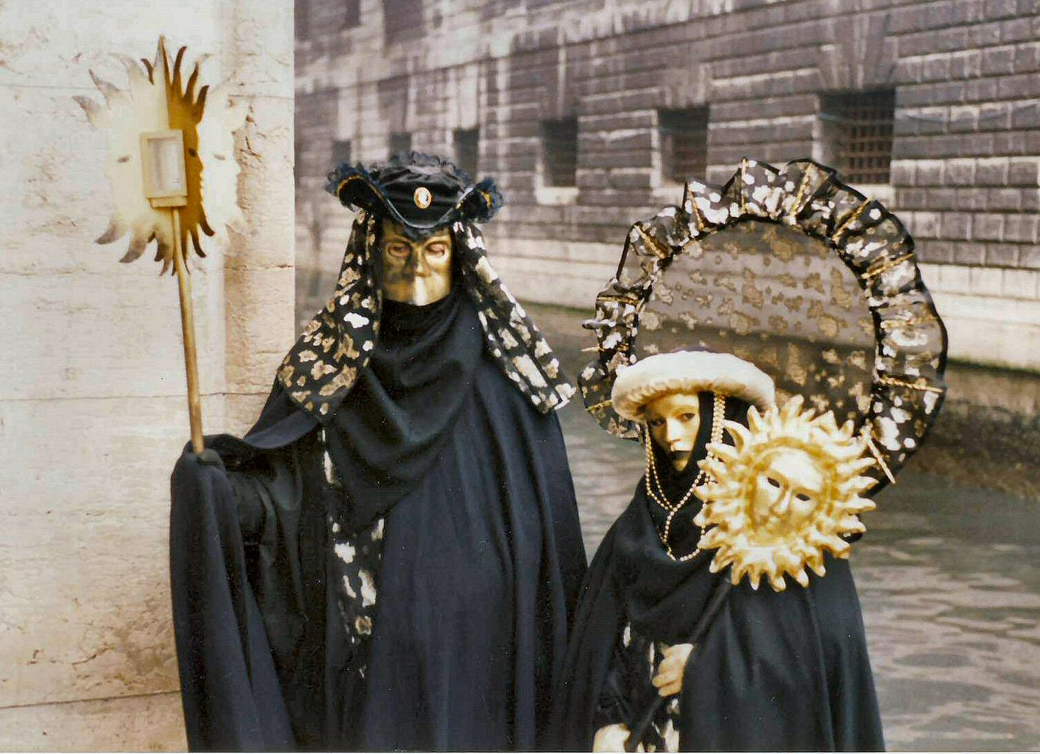 Carnival of Venice/Carnaval de Venise